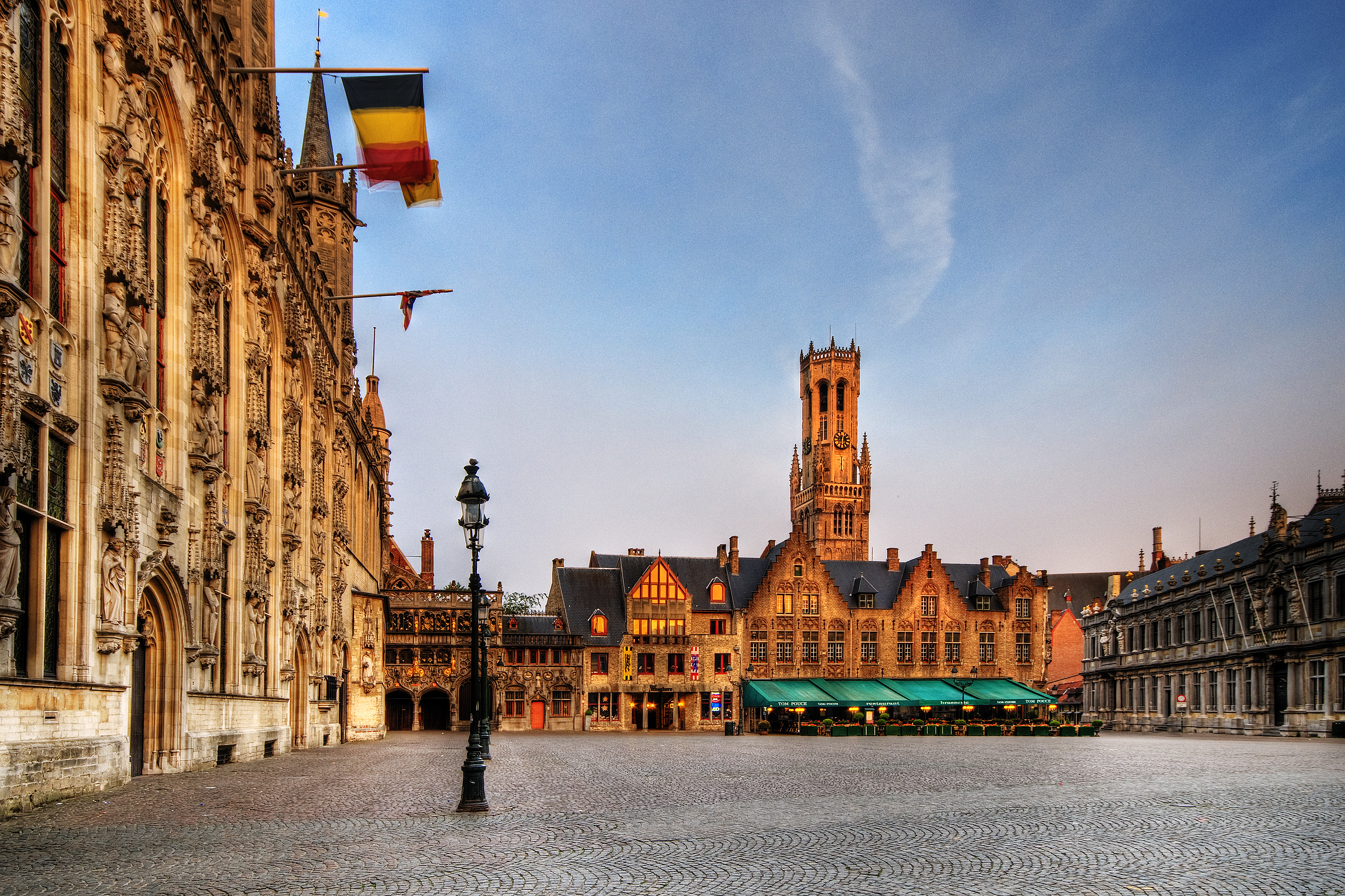 West-Vlams: De Burg is 't pling woa dat de geschiedenisse van Brugge begost is en woa dat den êestn burcht stound van de groavn van Vloandern, ols verdedigienge van de Vlamsche Kust teegn de Vikings. Round dien burcht groeide Brugge in de loatere eeuwn uut tout e weireldstad. De riviere de Reie die in dien tyd deur Brugge strôomde is nu hêlegans gekanaliseerd. From Wikipedia , the free encyclopedia